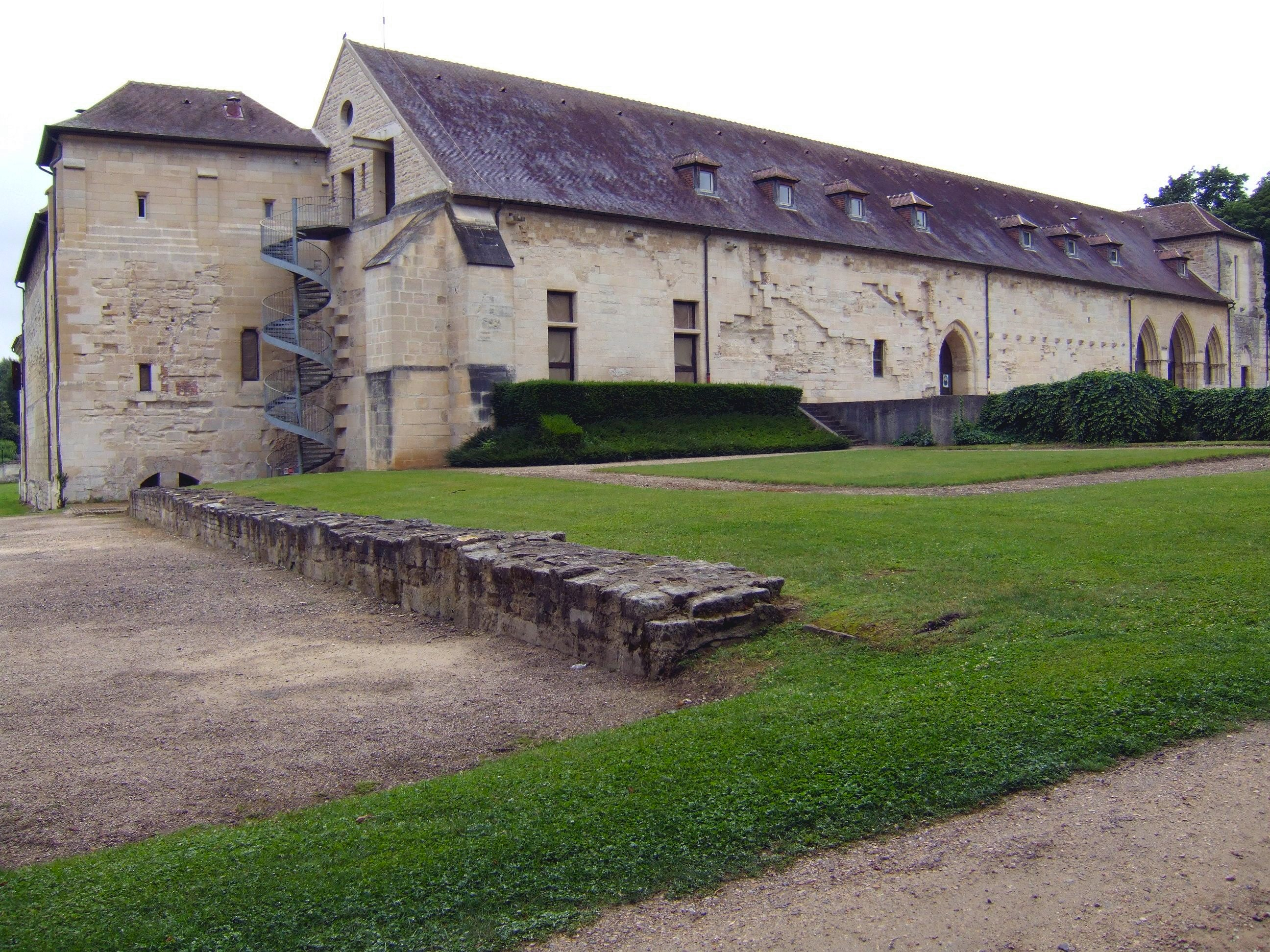 Abbaye de Maubuisson - façade nord